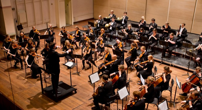 het orkest o.l.v. Quentin Clare